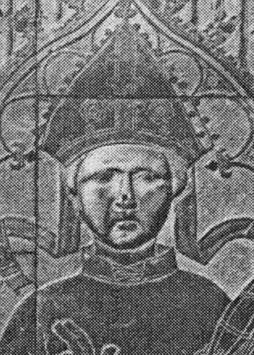 Nagrobek biskupa Rudolfa von Rüdesheim